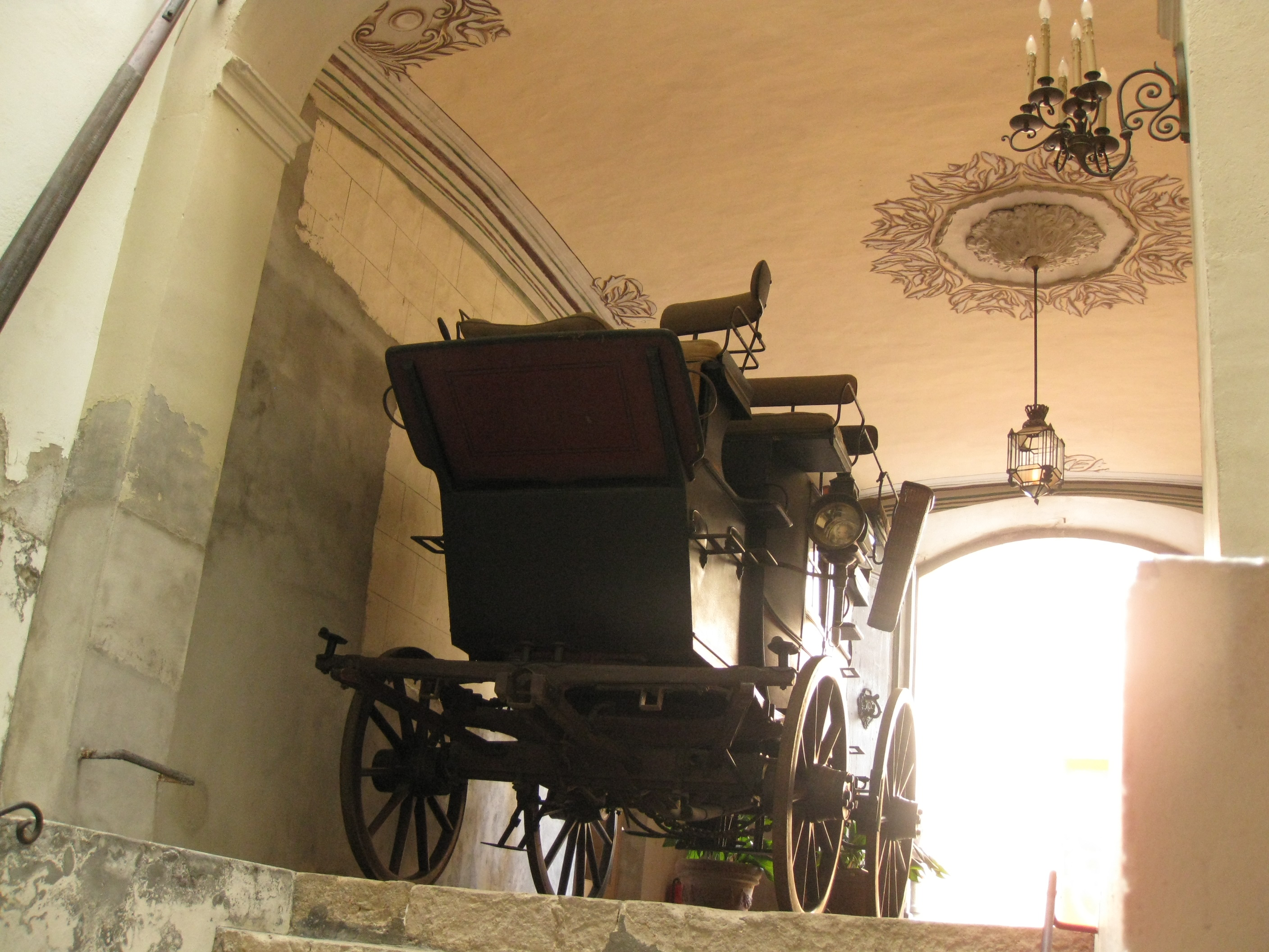 Museu Romàntic Can Llopis (Sitges)